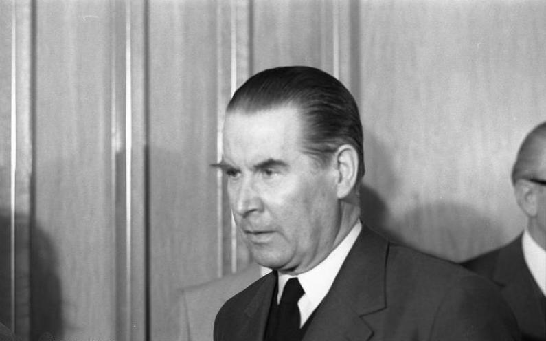 Als neuer Vorstizender der CDU/CSU-Bundestagsfraktion wird Prof. Dr. Karl Carstens von K. G. Kiesinger vor dem CDU-Fraktionssaal des Bundestages vorgestellt (im Bild: Gerhard Schröder, CDU)